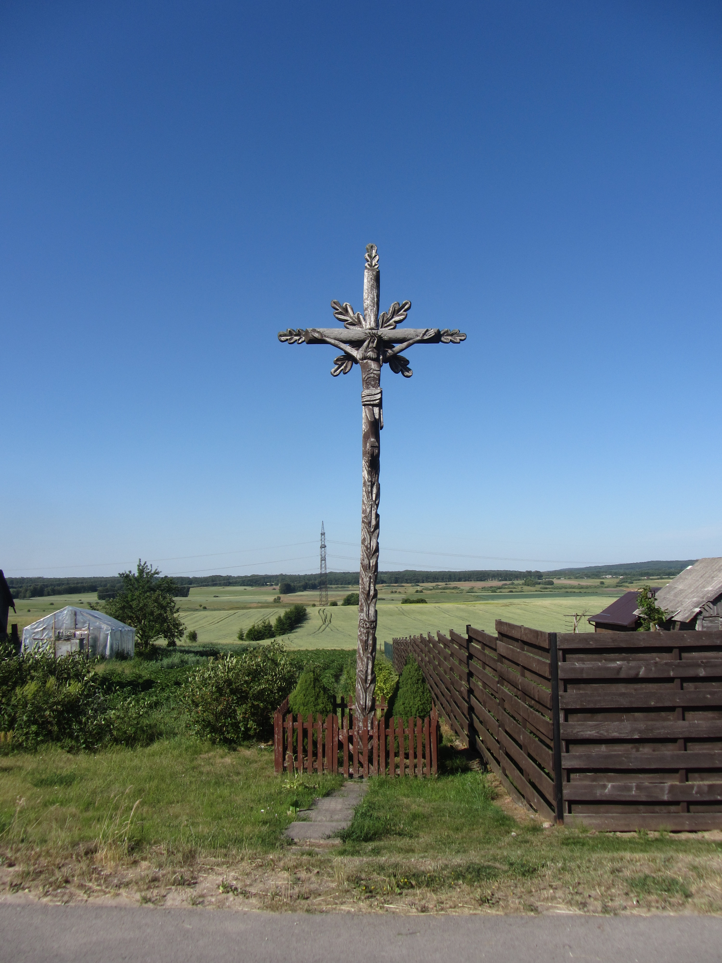 Mediniai Strėvininkai 56245, Lithuania